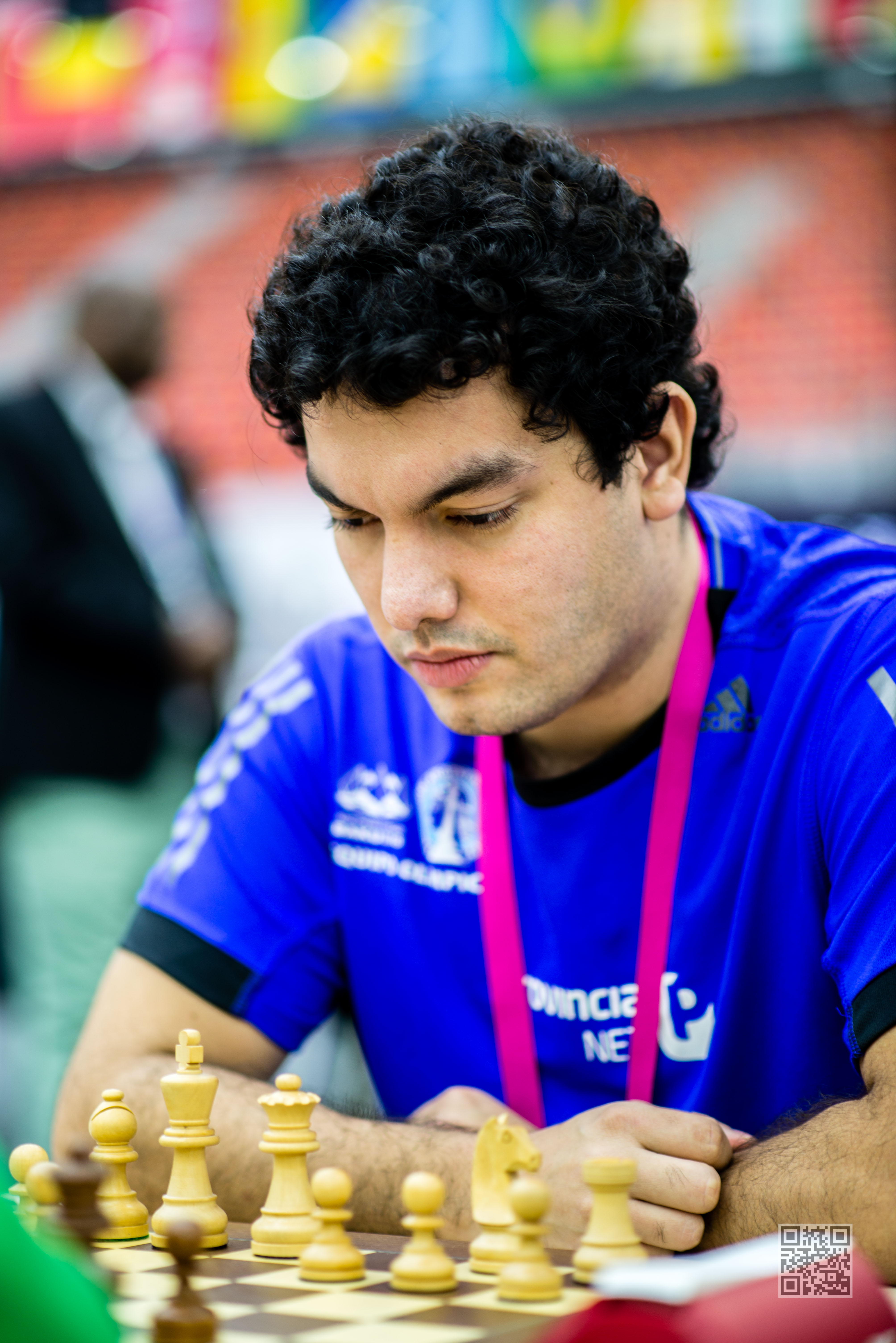 Sandro Mareco